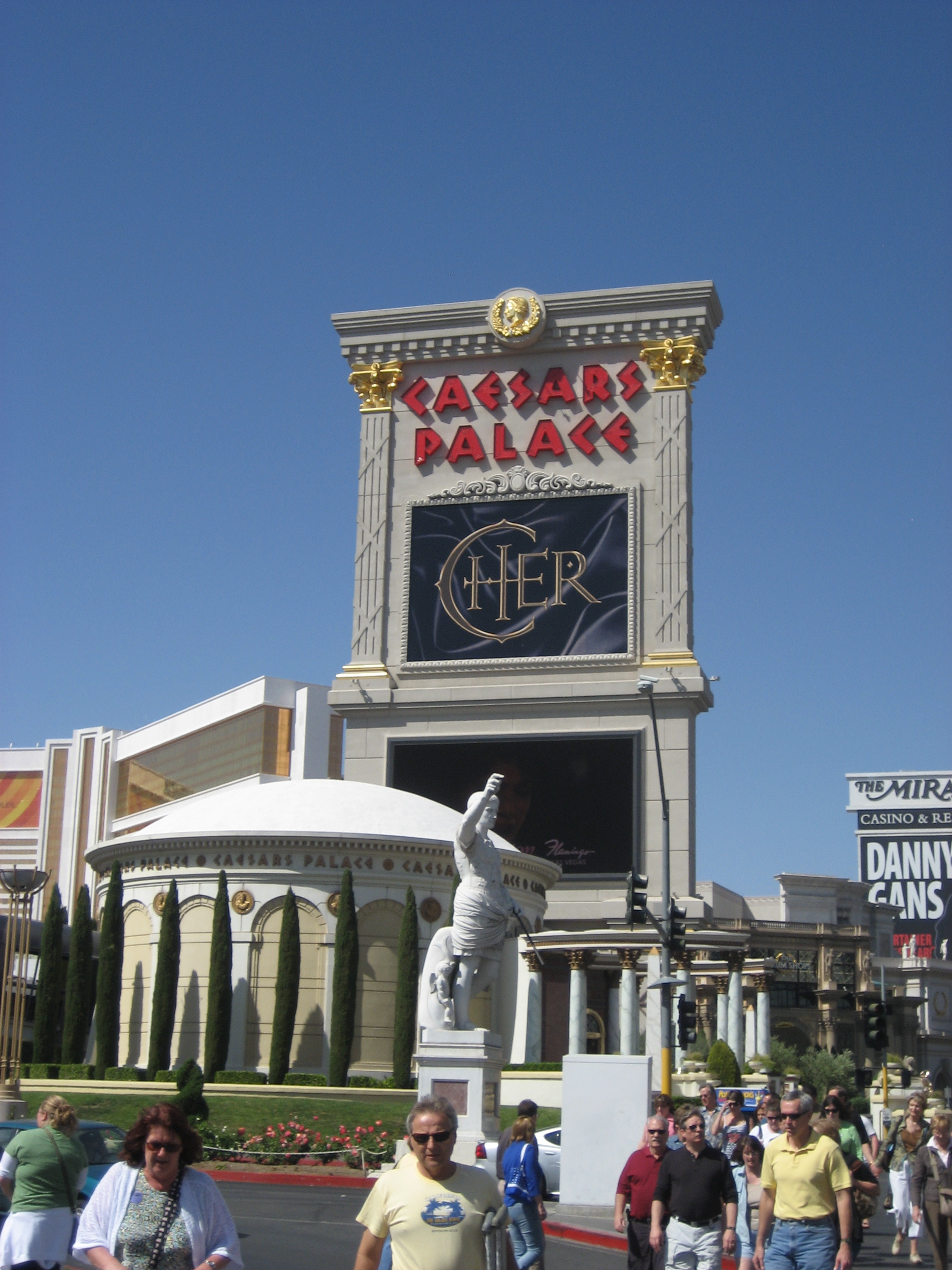 Imagen publicitaria de la cantante Cher en el hotel Caesars Palace de las Vegas